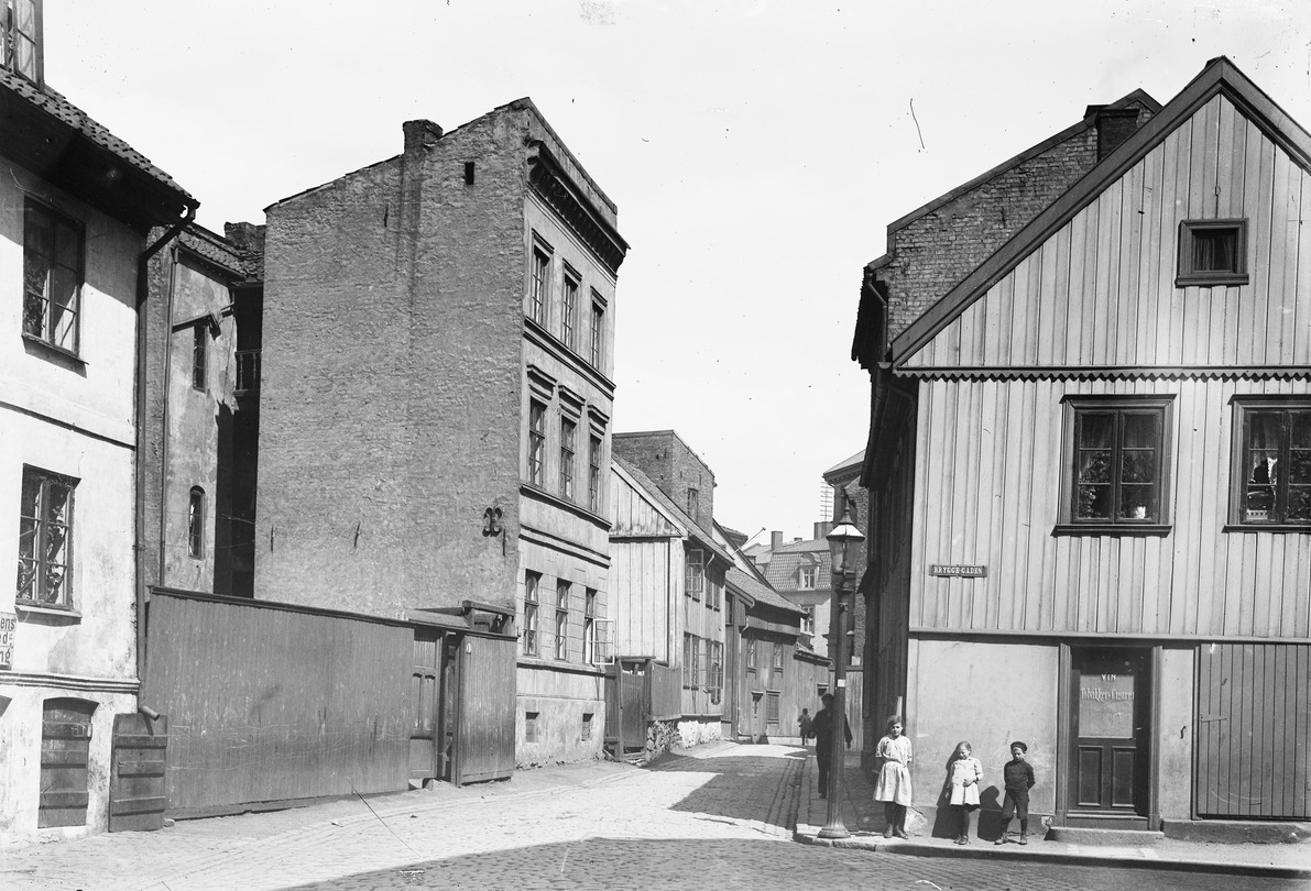 Strandgaten går innover i dette bildet fra 1910, mens Bryggegaten går ut til høyre. Foto: Johannes Holmsen/Oslo Museum. Fra Byhistorisk samling.